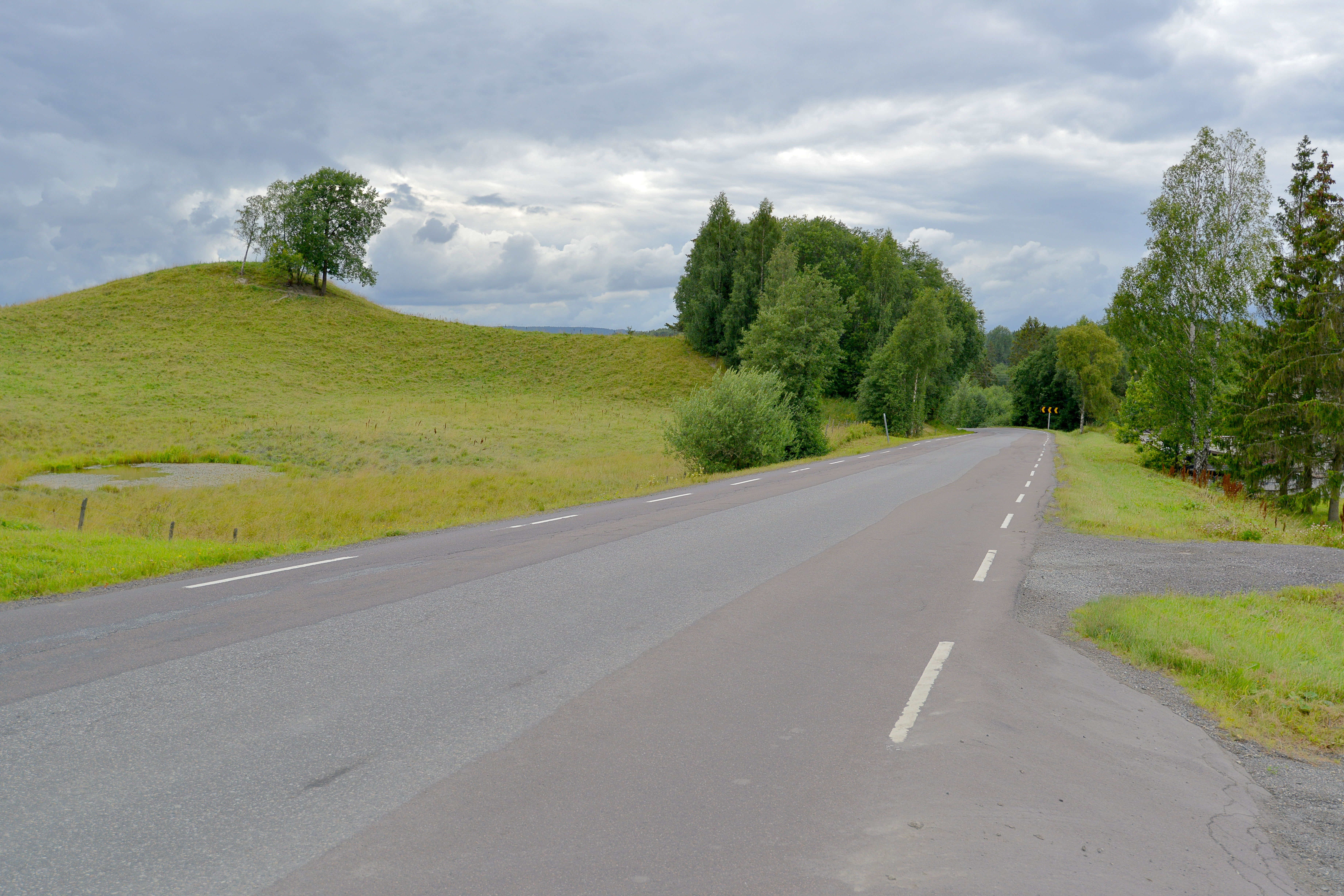 Fylkesvei 455 i Ullensaker